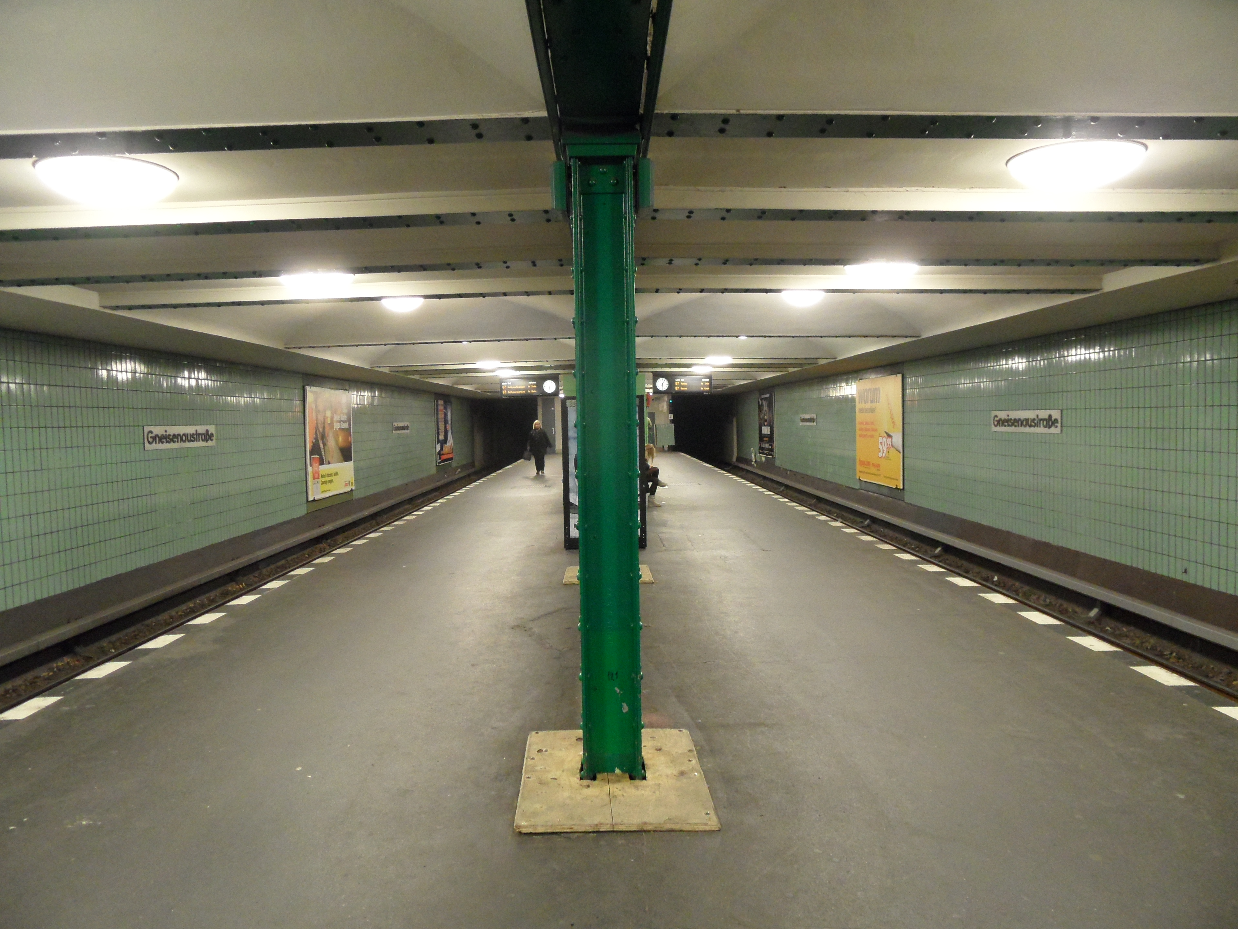 Berlin - U-Bahnhof Gneisenaustraße - Linie U7